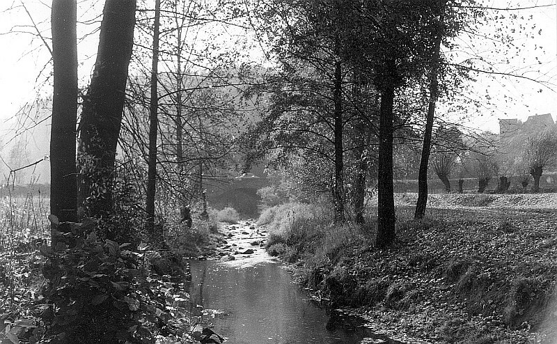 Original image description from the Deutsche FotothekTriebischtal-Tanneberg. Die Triebisch bei Neu-Tanneberg